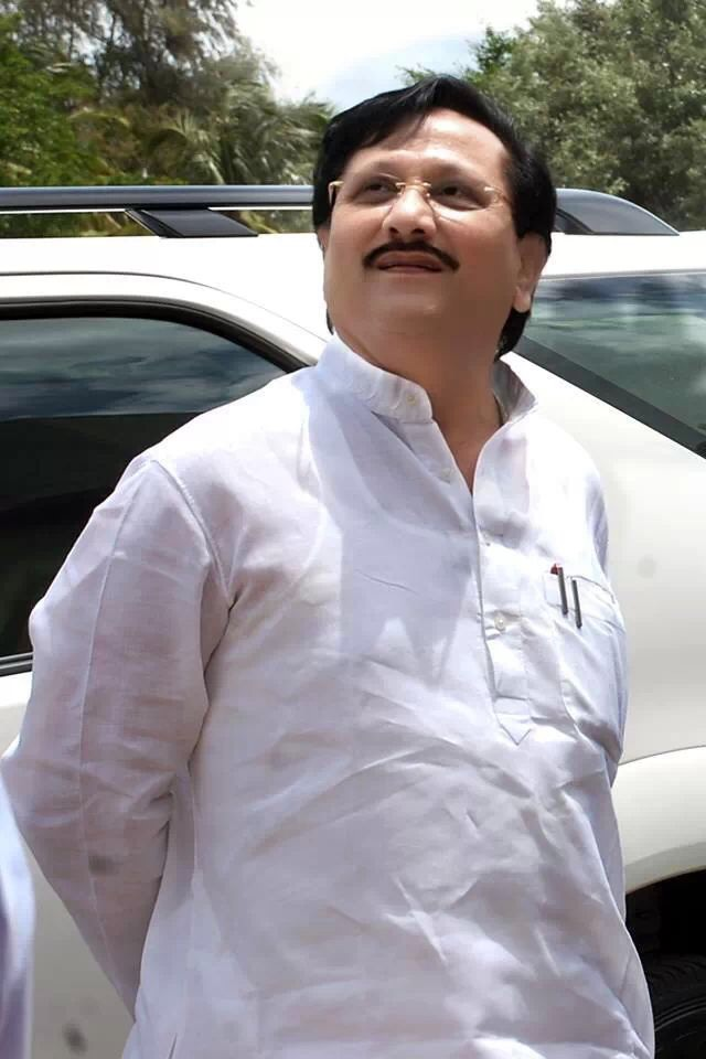 Vijaysinh Mohite Patil